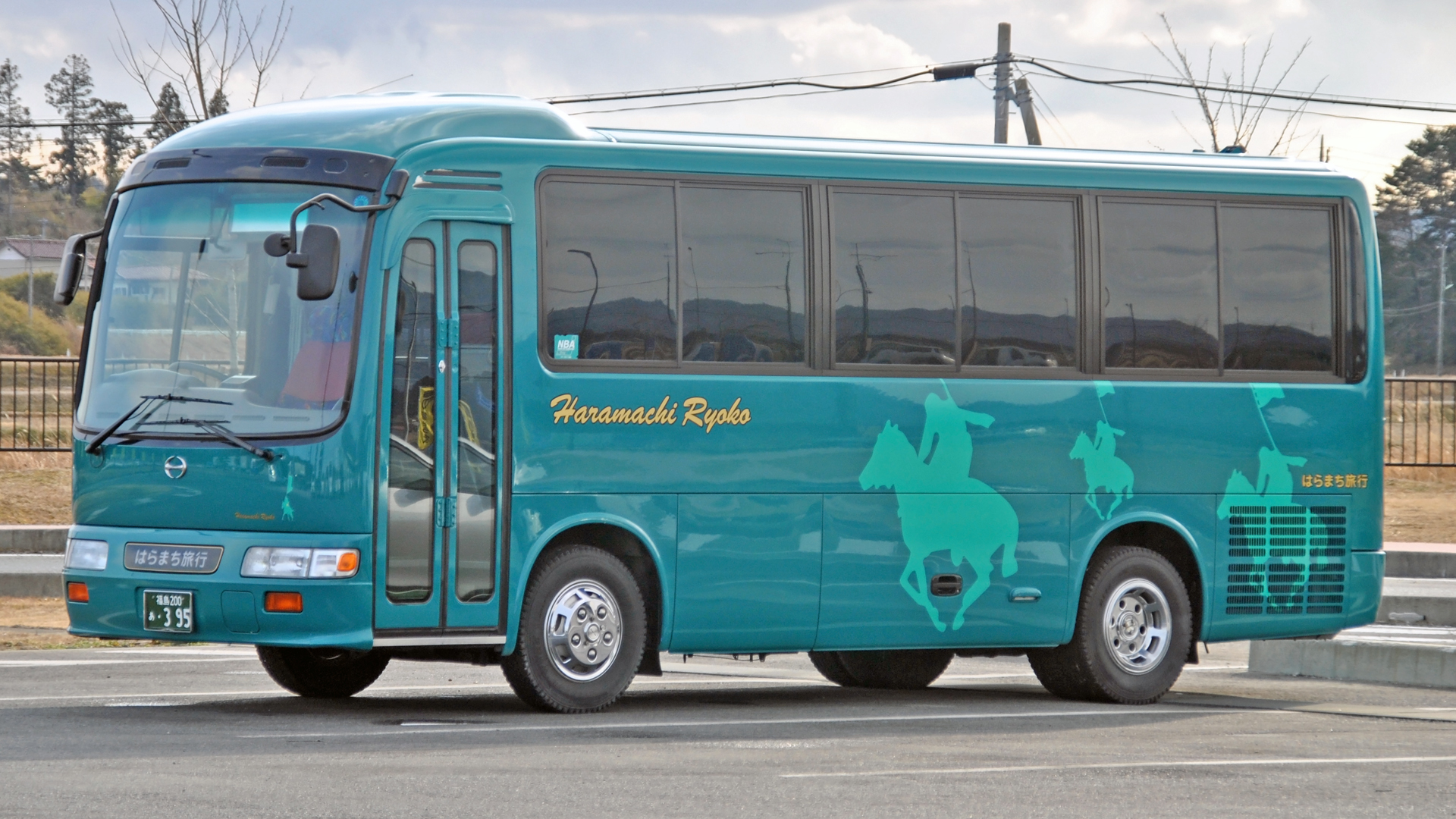 はらまち旅行の日野・リエッセ